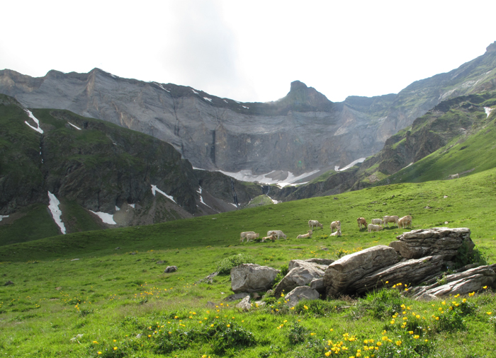 Pâturage dans la vallée de La Gela, sous l'escarpement dit "le Pichous de Barroude" (sombre, à gauche) et, plus haut, la muraille de Barroude surmontée de la dent du Pic Gerbats.